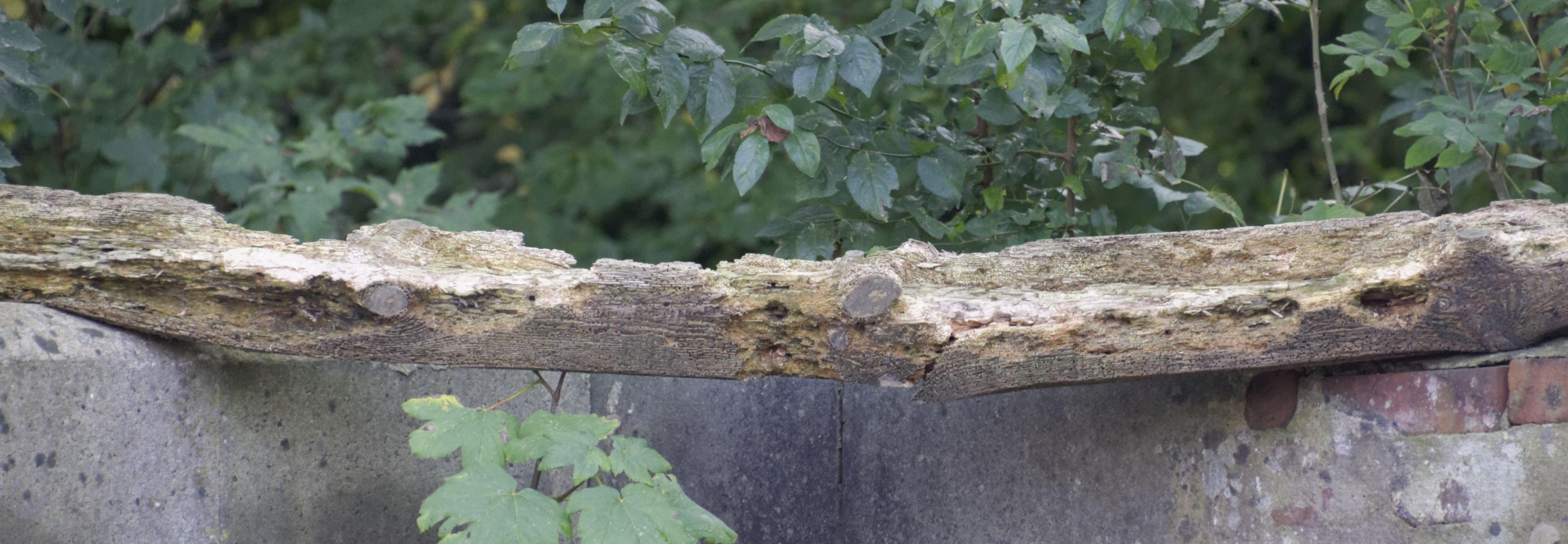 ein über Jahre vergessener Balken als Nisthilfe für Insekten